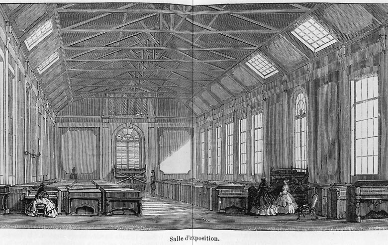 Manufacture des Orgues Alexandre, Ivry sur Seine, salon d'exposition